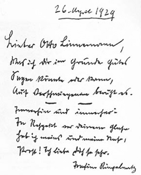 Handschriftliche Notiz von Joachim Ringelnatz an seinen Freund Professor Otto Linnemann, einen bekannten Glasmaler. 26.April 1929 Lieber Otto Linnemann, Was ich dir im Grunde Gutes Sagen könnte oder kann, auf Verschwiegenem beruht es. Immerhin und immerher - In Respekt vor deinem Glase Heb ich meins und meine Nase, Prost! Ich liebe dich so sehr. Joachim Ringelnatz